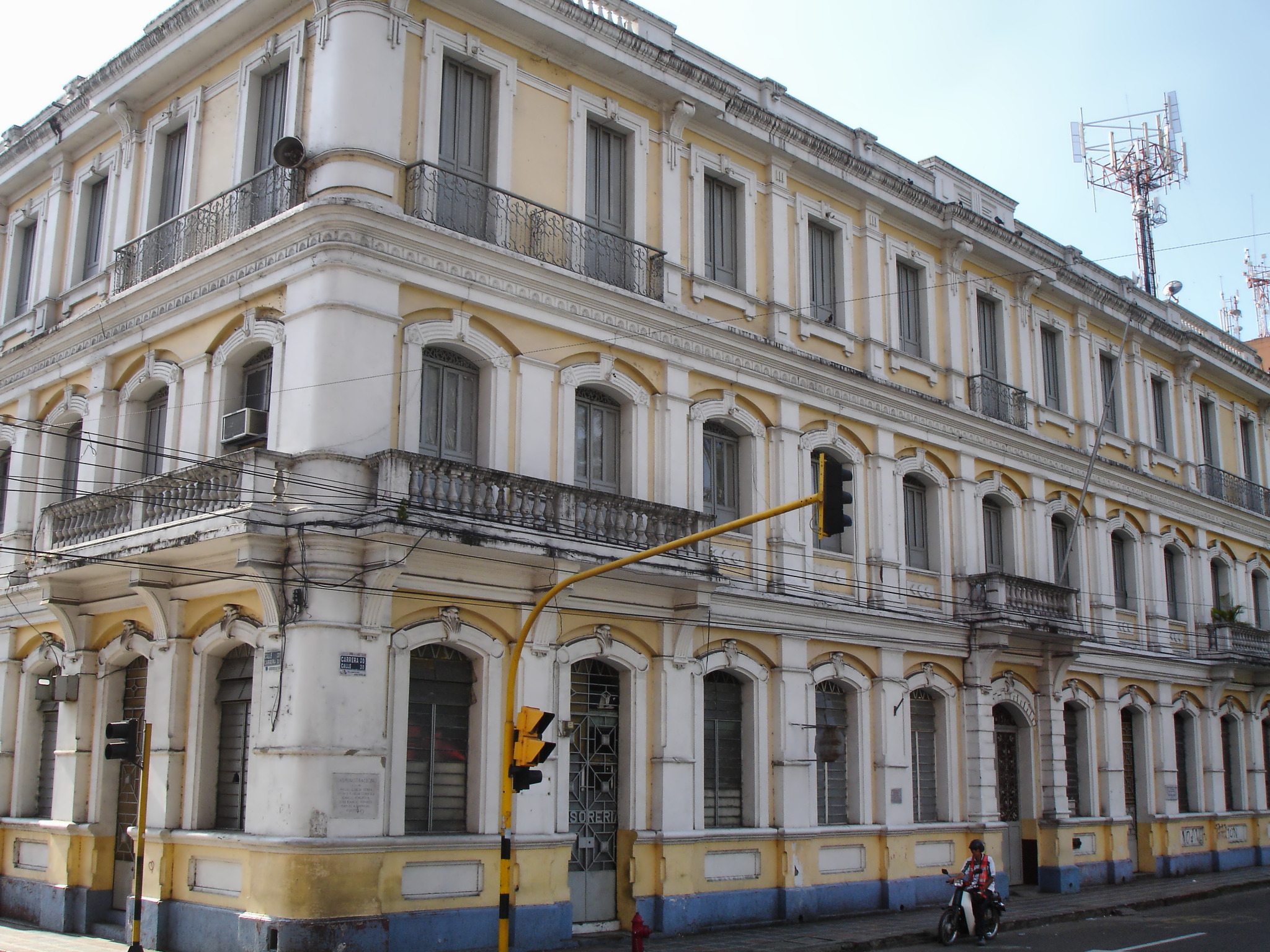 Antiguo Edificio de la Alcaldía de Palmira